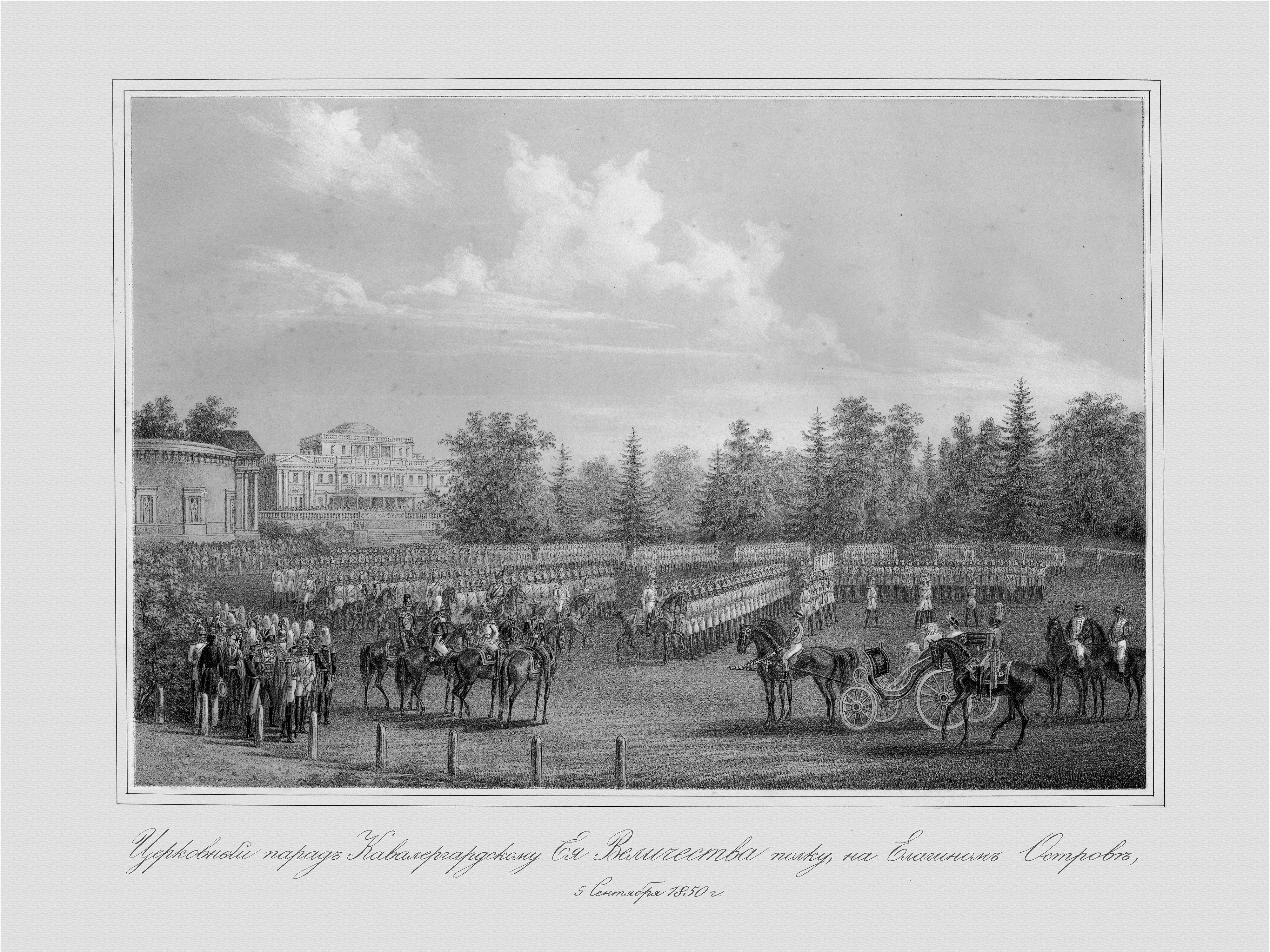 lithographie représentant une revue du régiment impérial russe des Chevaliers Gardes